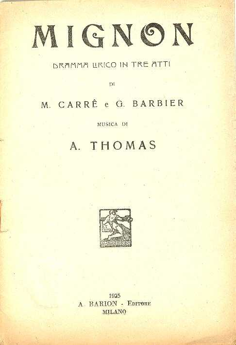 Copertina del libretto "Mignon" dramma lirico in tre atti di M. Carré e G.Barbier musica di Ambrogio Thomas - edizioni Attilio Barion, Milano, Italia 1925